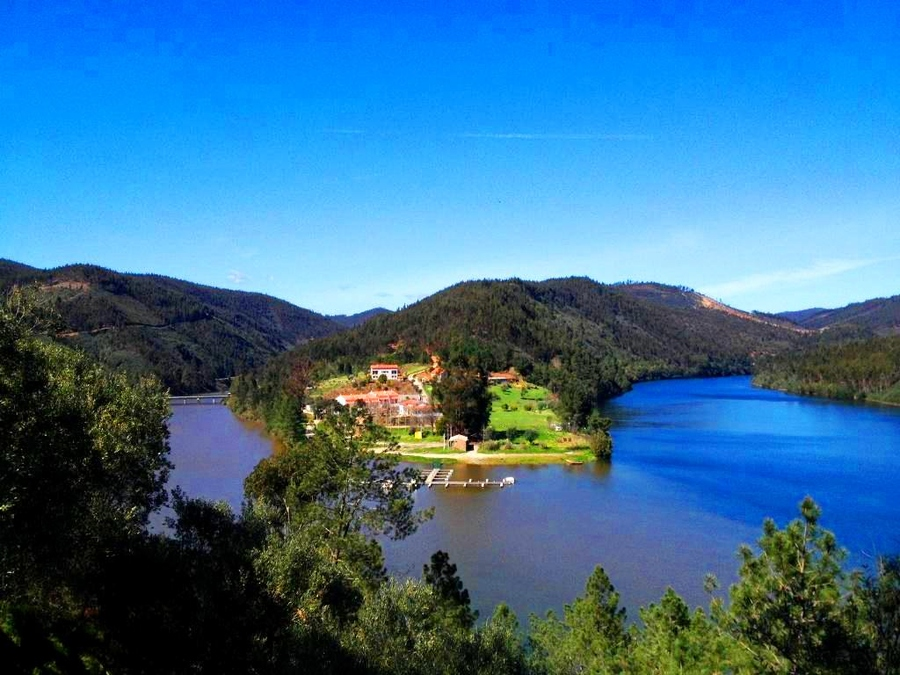 Пейзаж в Фигейро-душ-Виньюш, Португалия.